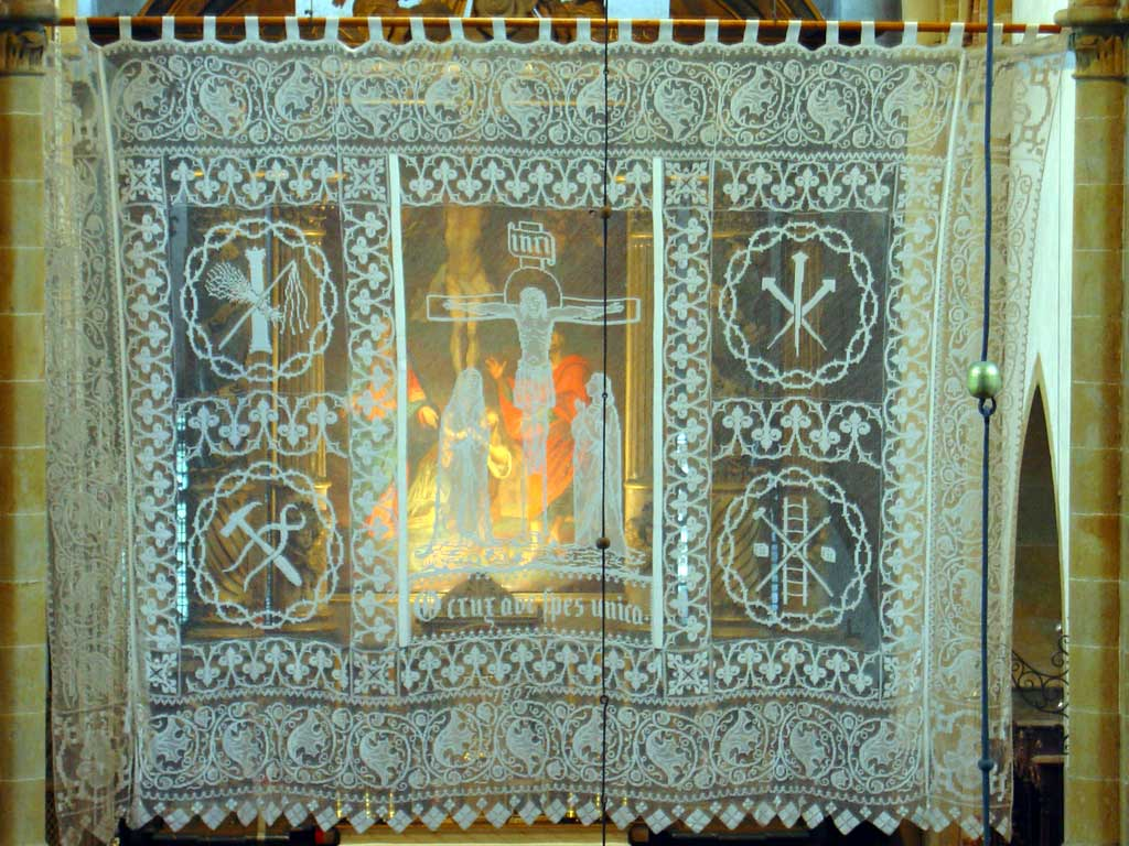 Marienfelder Hungertuch (Kloster Marienfeld)